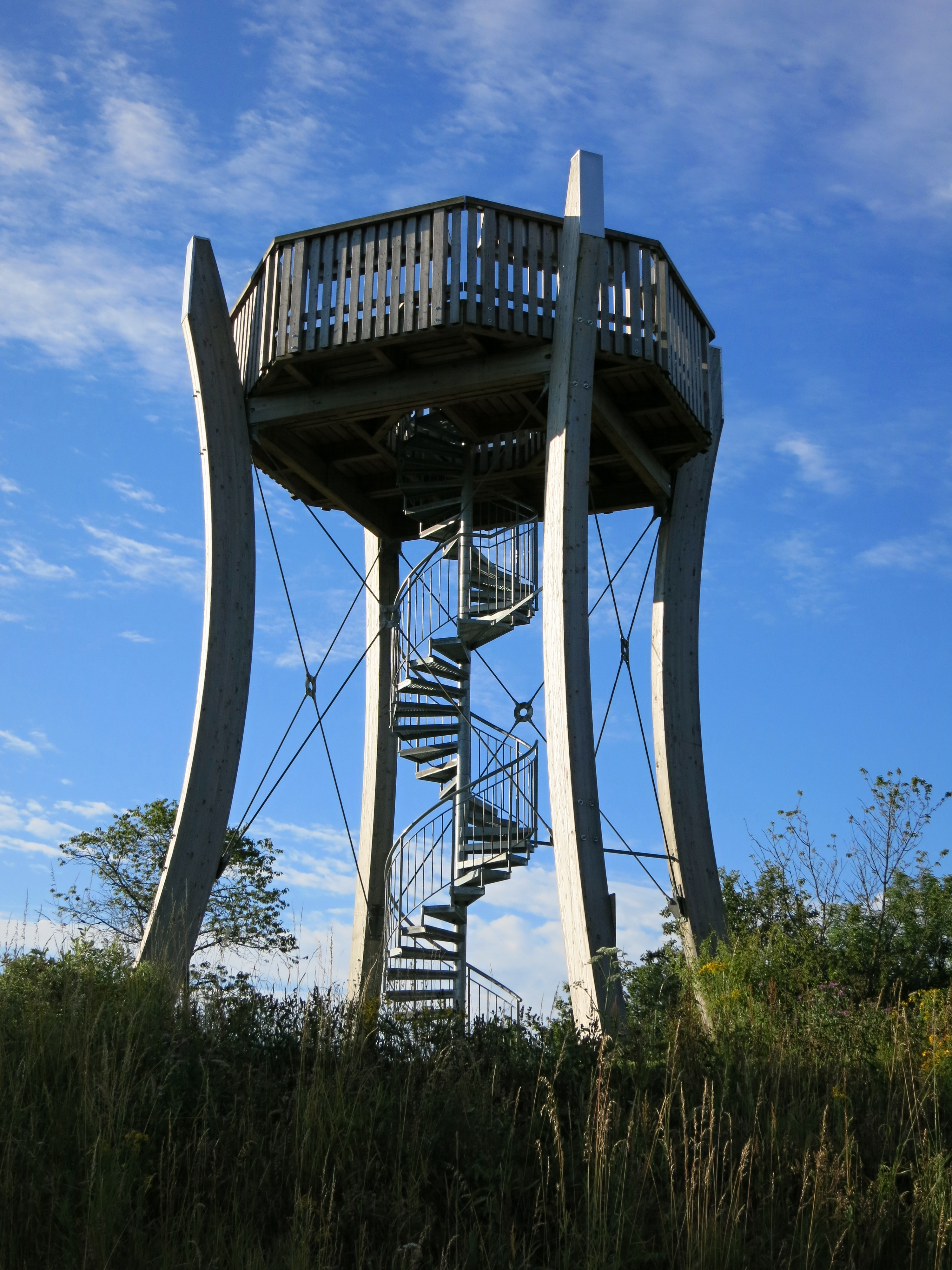 Panoramaturm Pleigne